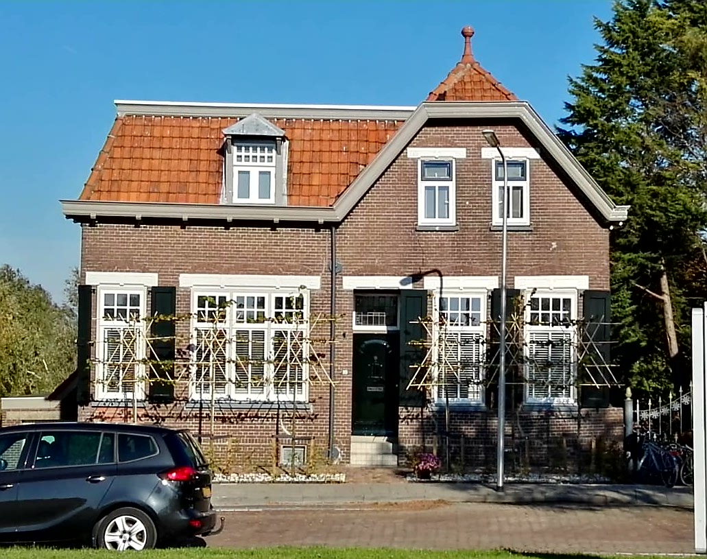 Woon-winkelpand A van Zessen West Kinderdijk 119 Alblasserdam. Zomer 2018